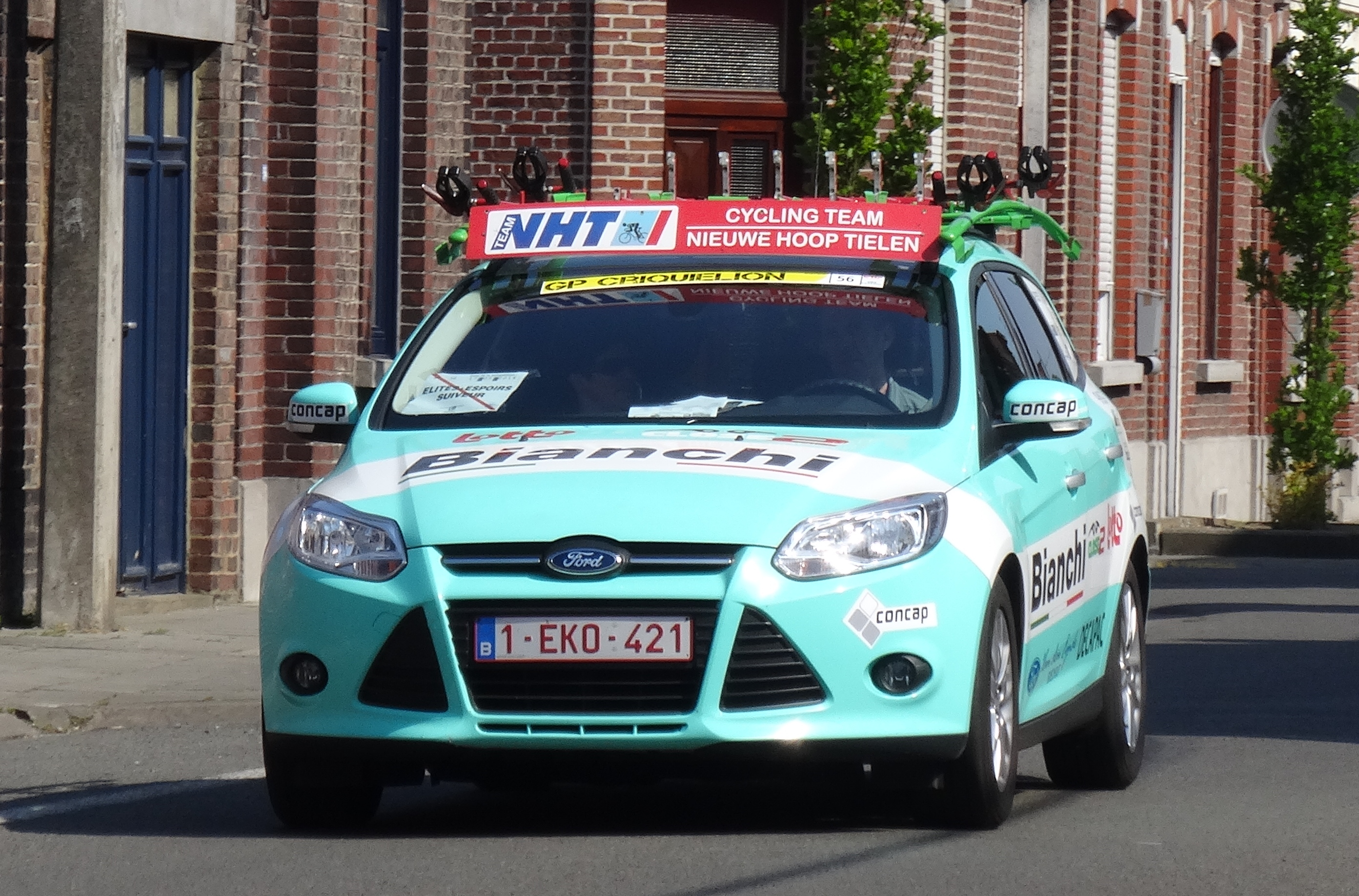 Reportage réalisé le samedi 17 mai à l'occasion du départ du Grand Prix Criquielion 2014 à Boussu, Belgique.